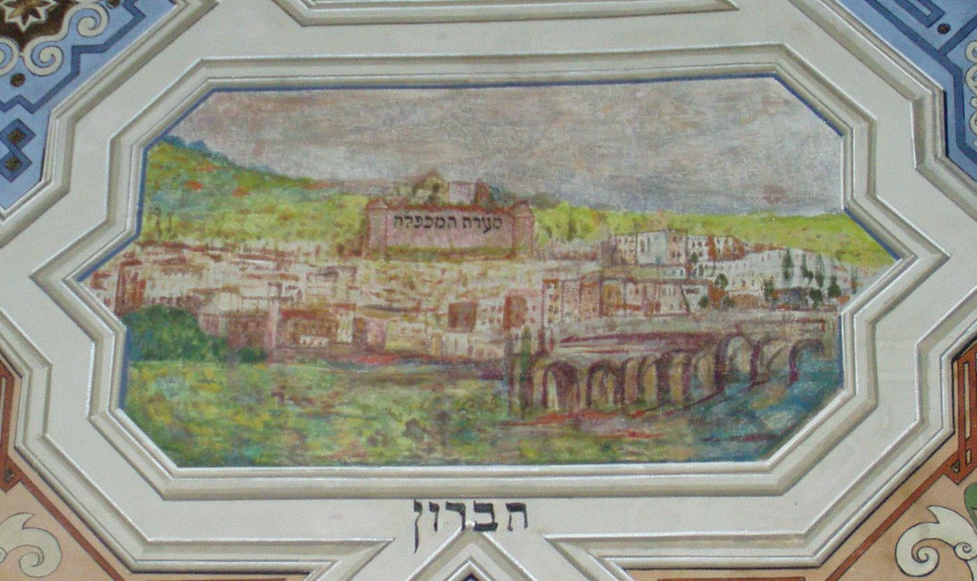 Sceny biblijne na stropie synagogi Kupa w Krakowie